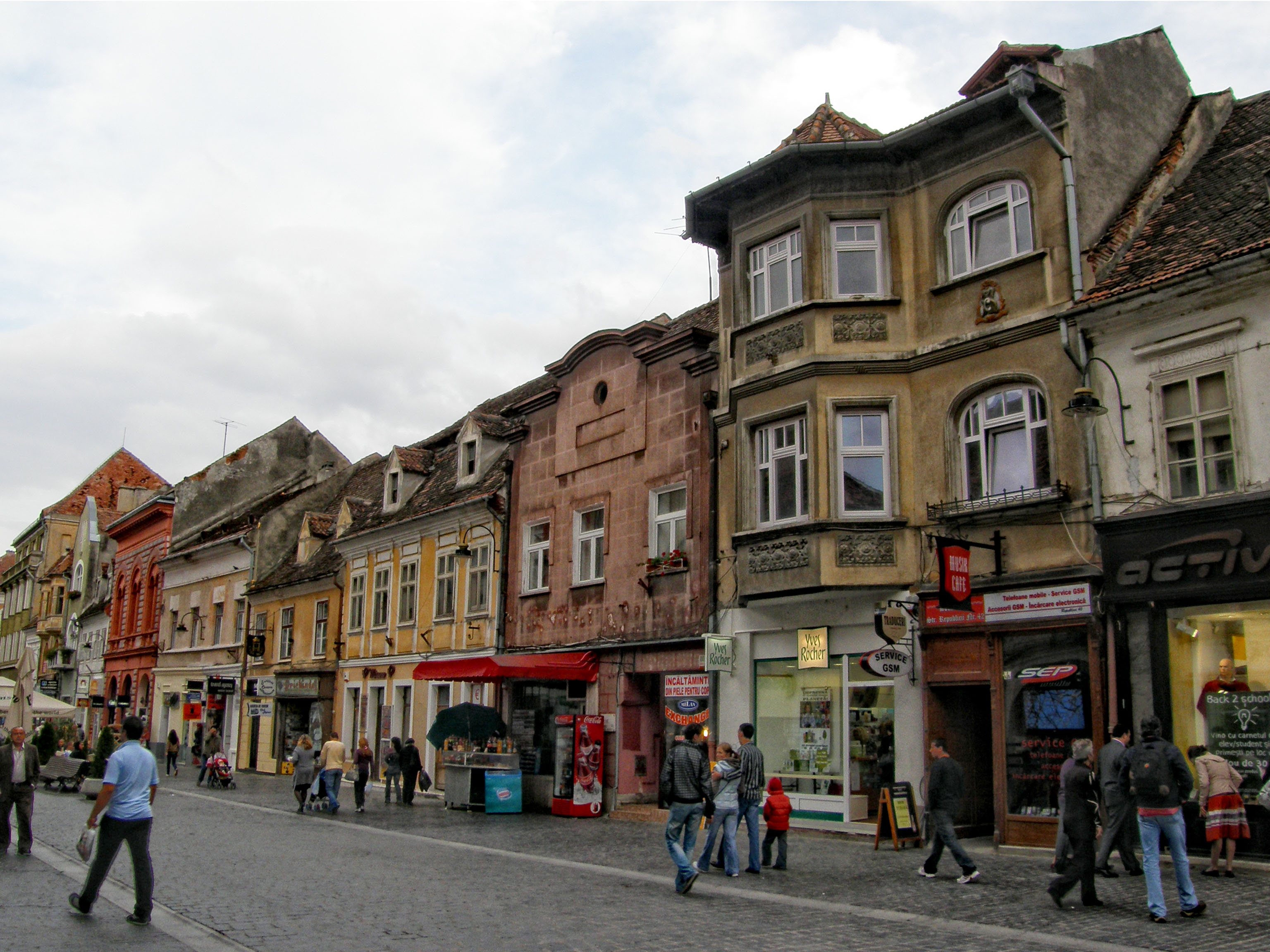 Strada Republici, Brașov